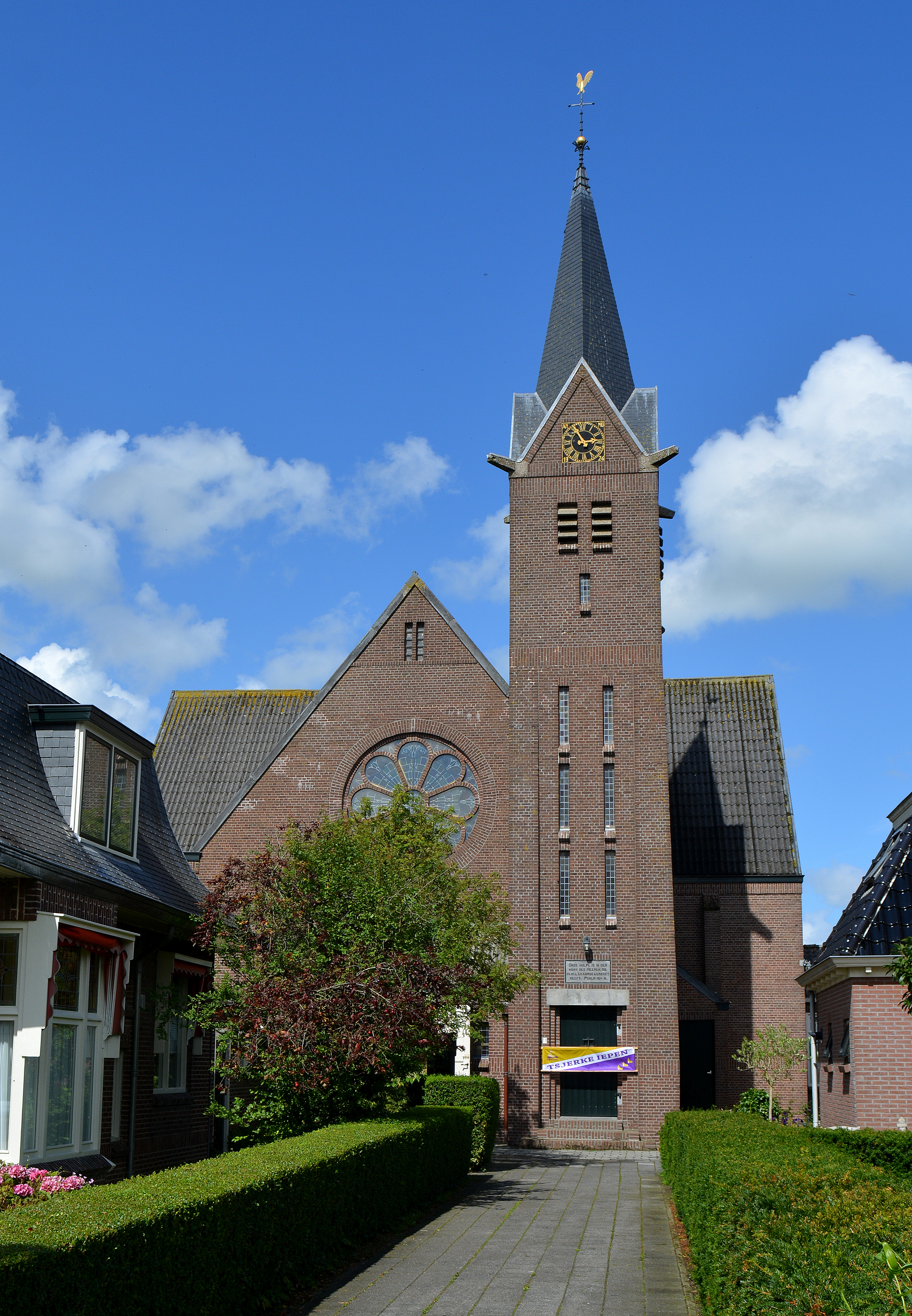 Beetgumermolen, Gereformeerde kerk